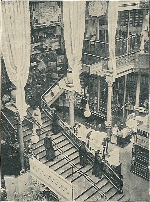 Trappen i hovedhallen i Magasin du Nord omkring år 1900